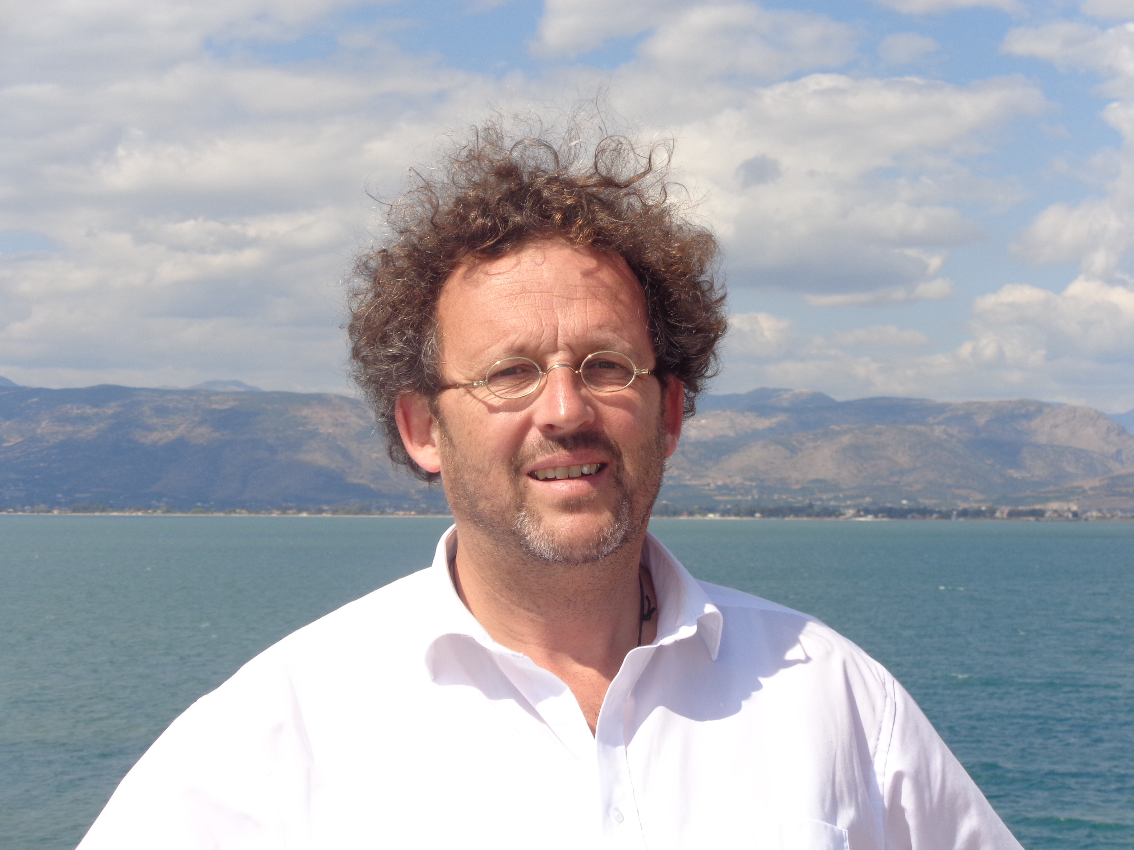 Porträtaufnahme von Mark Mast